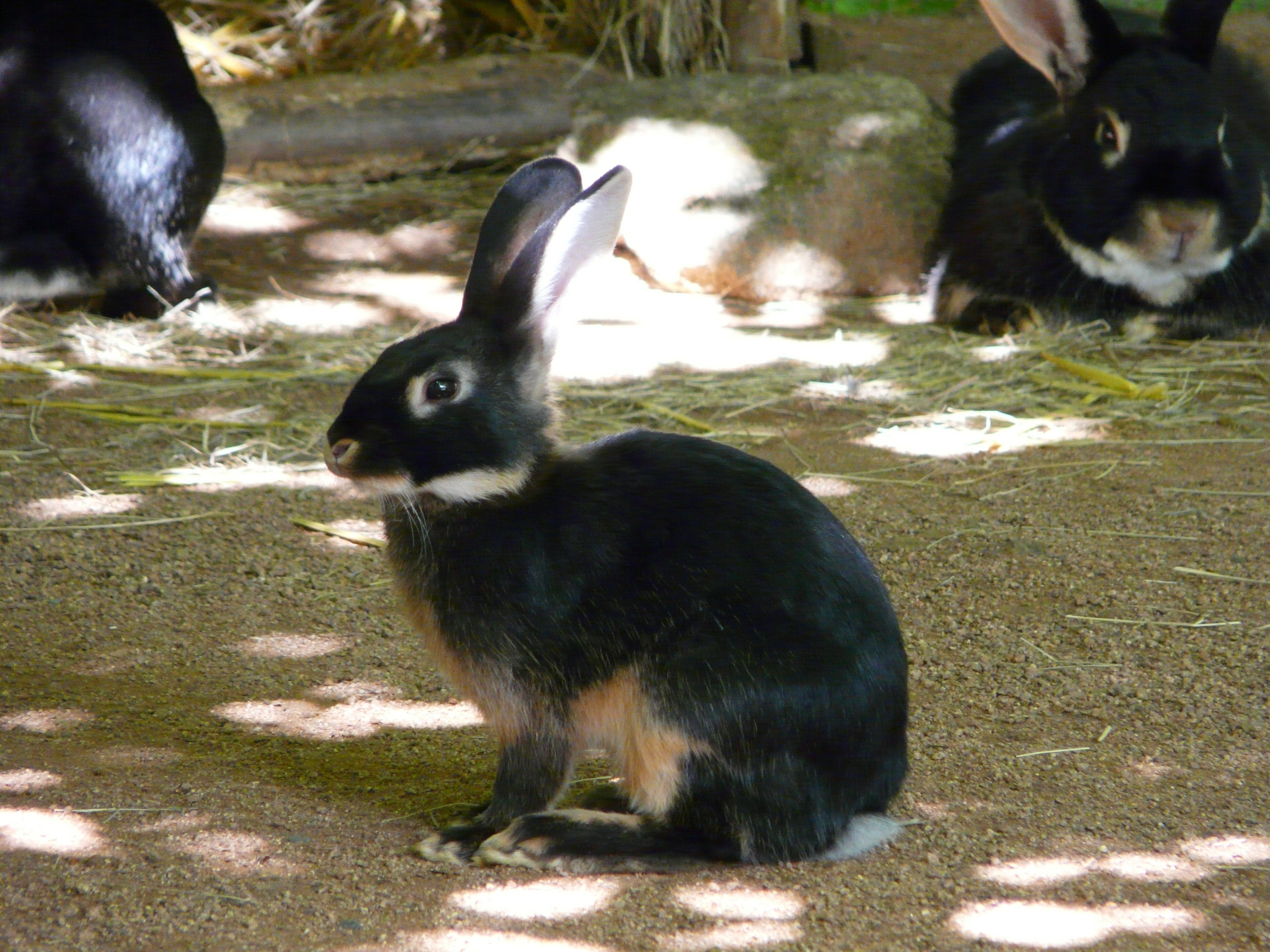 Lapin chèvre, Grand parc du Puy du Fou, Vendée, France